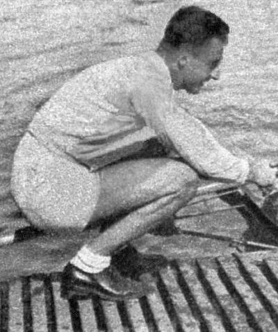 Jean Séphériades en août 1943.